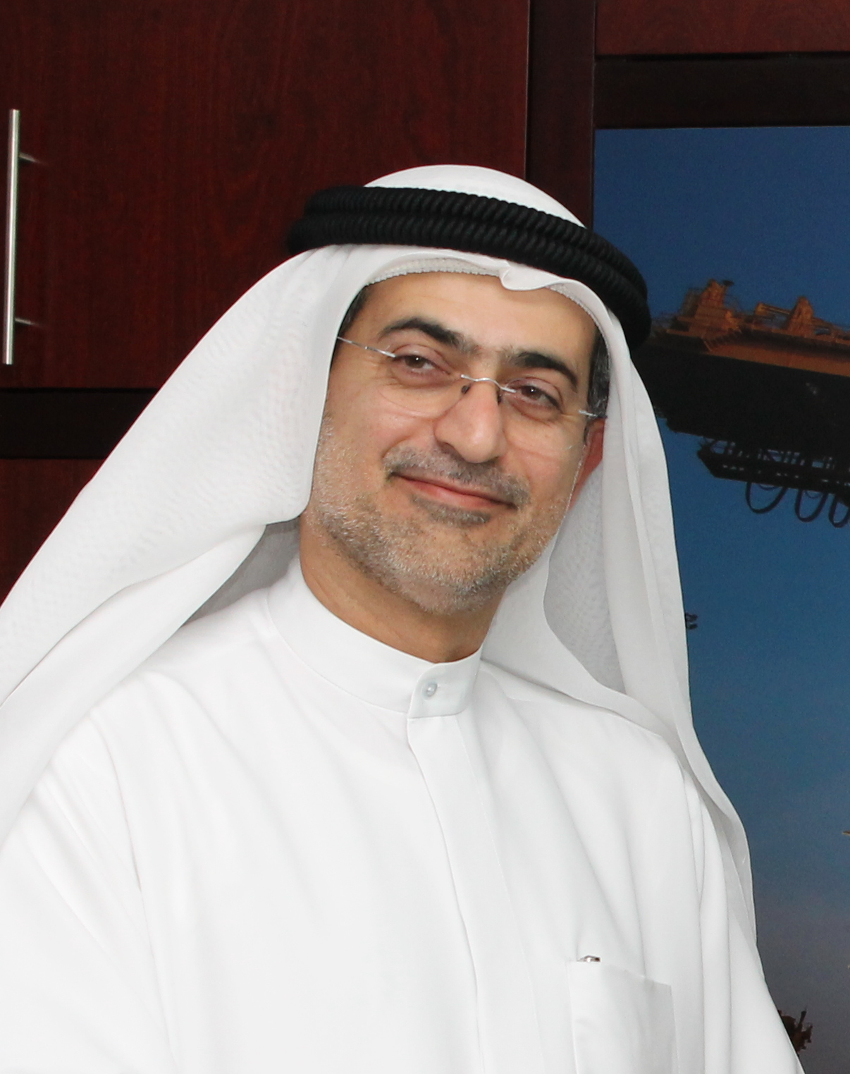 Ministru prezidents Valdis Dombrovskis un ekonomikas ministrs Daniels Pavļuts tiekas ar ostu operatora DP World valdes priekšsēdētāju Mohamadu Šarafu (Mohammad Sharaf).